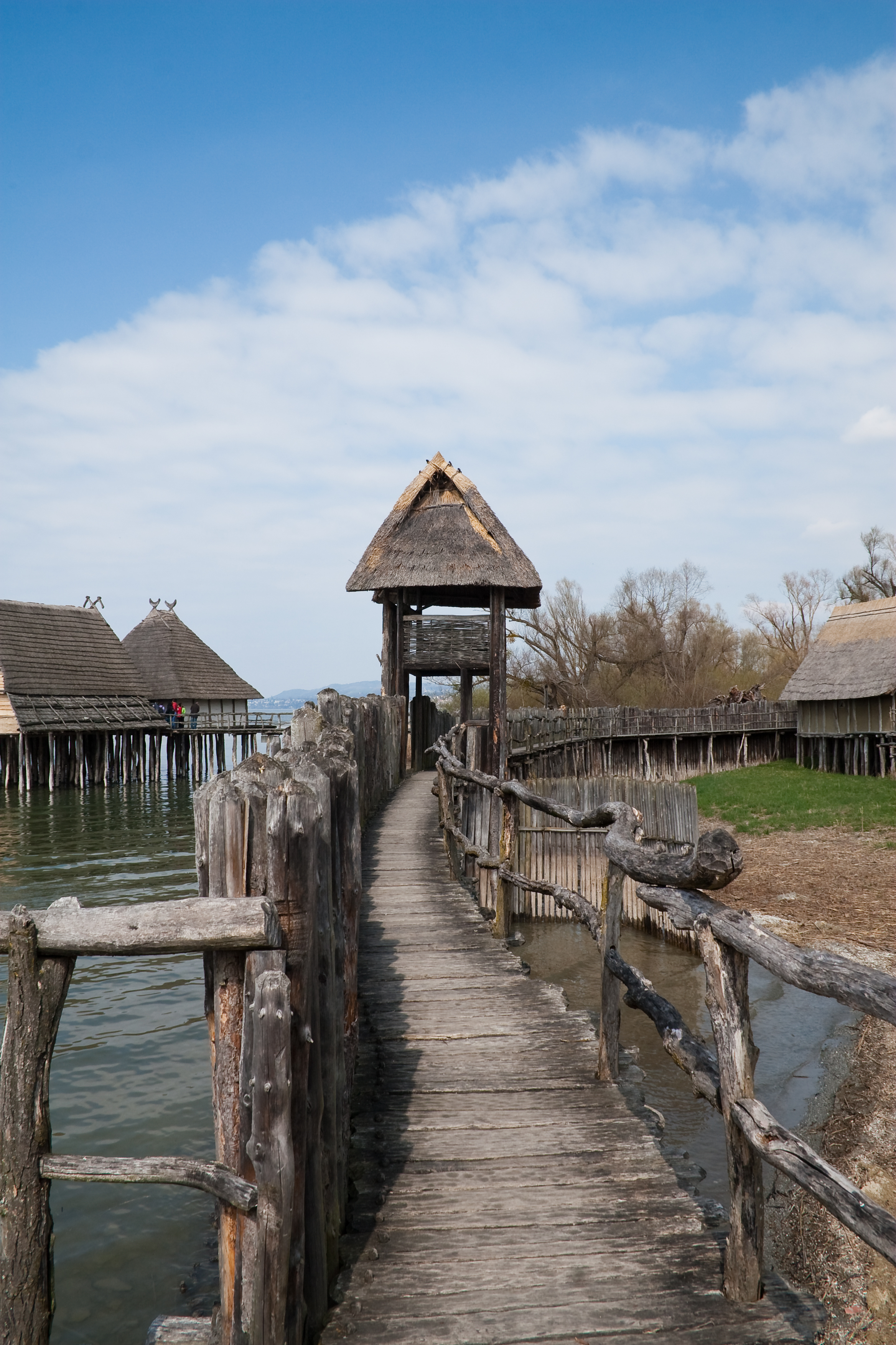 Pfahlbaumuseum Unteruhldingen, Uhldingen-Mühlhofen, Baden-Württemberg, Germany